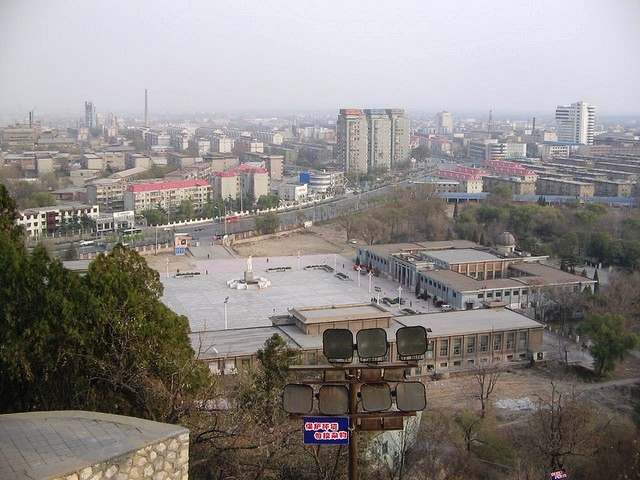 TangShan